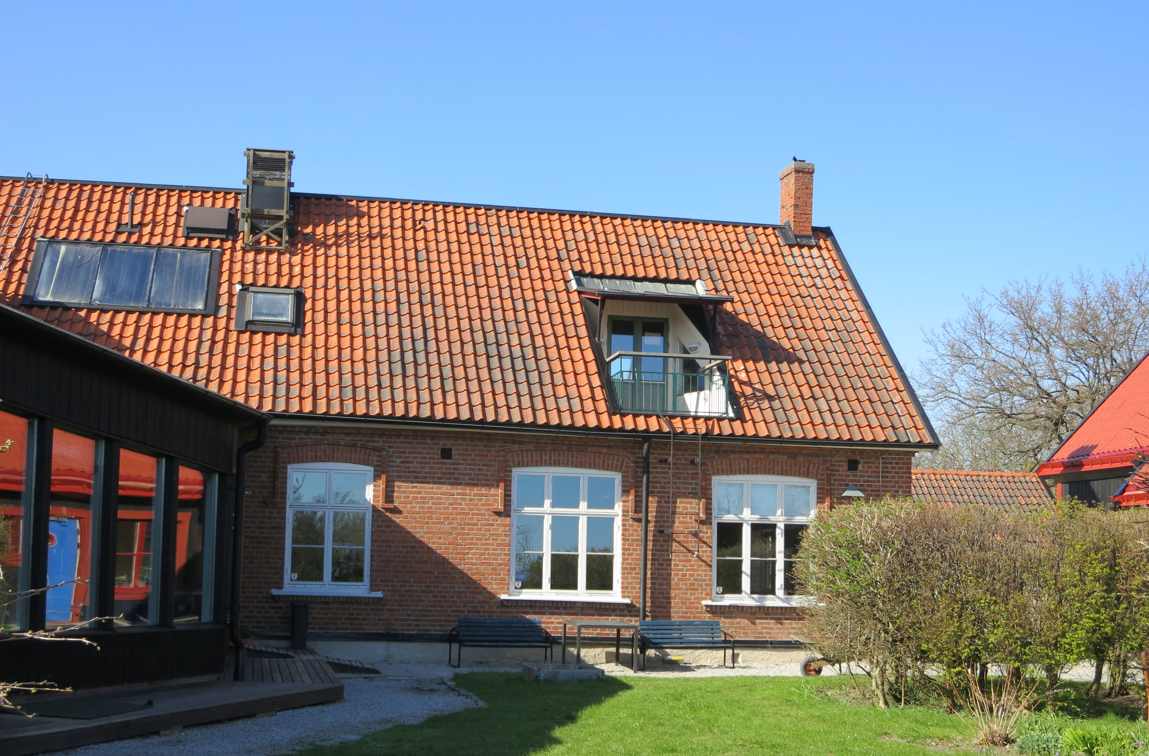 Kvarnby folkhögskola, belägen i Kvarnby, Malmö.